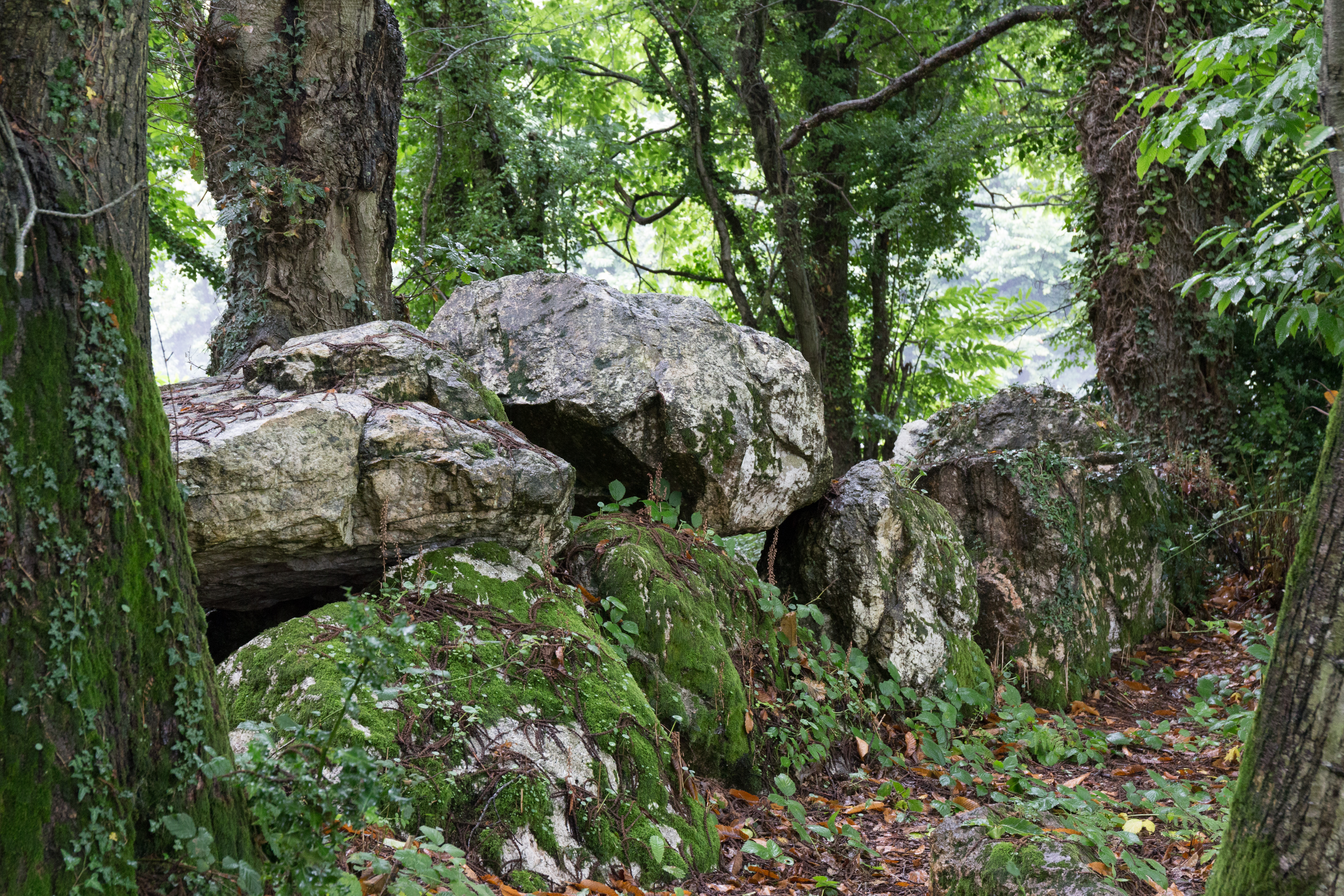 Allée couverte de Bel Evan à Plouër-sur-Rance.